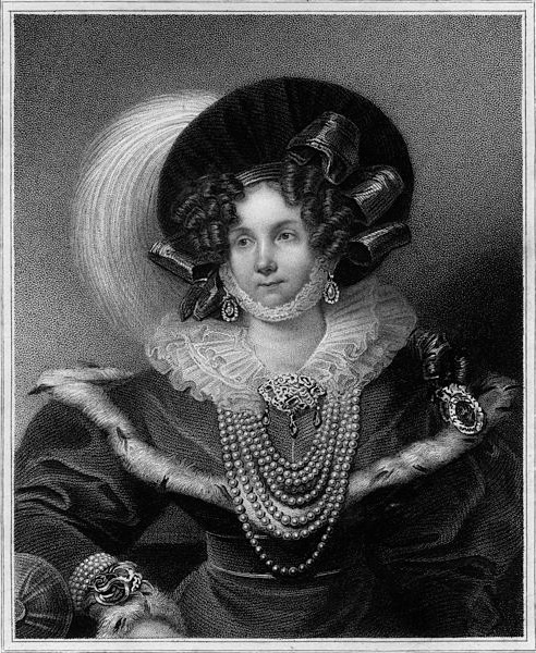 Friederike von Mecklenburg-Strelitz